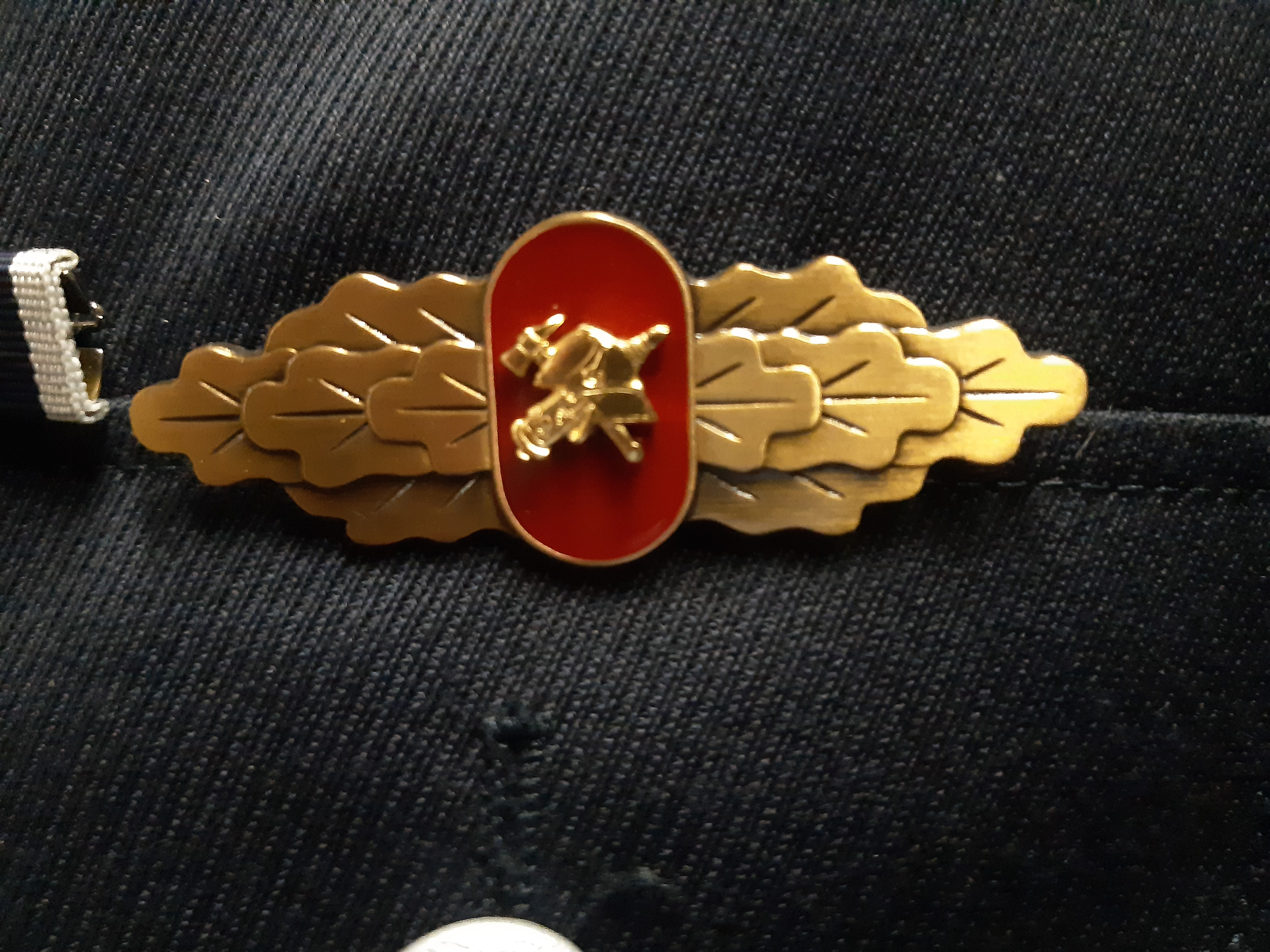 Ehrennadel